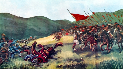 Batalla de Quechereguas, 1868. Carga de la caballería mapuche, comandada por el cacique Quilapan en contra de las tropas chilenas al mando del comandante Pedro Lagos. Grabado de Luis Rogers.